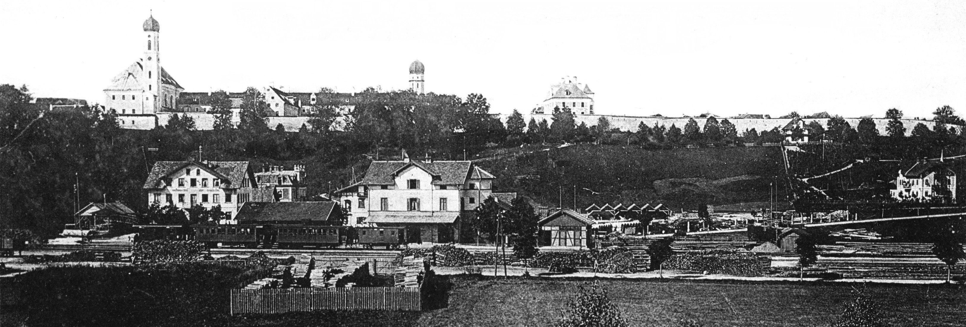 Blick auf Schongau von Osten, mit links Heilig-Geist-Kirche über der Stadtmauer, im Vordergrund der Bahnhof. Ausschnitt aus einer Ansichtskarte, um 1902